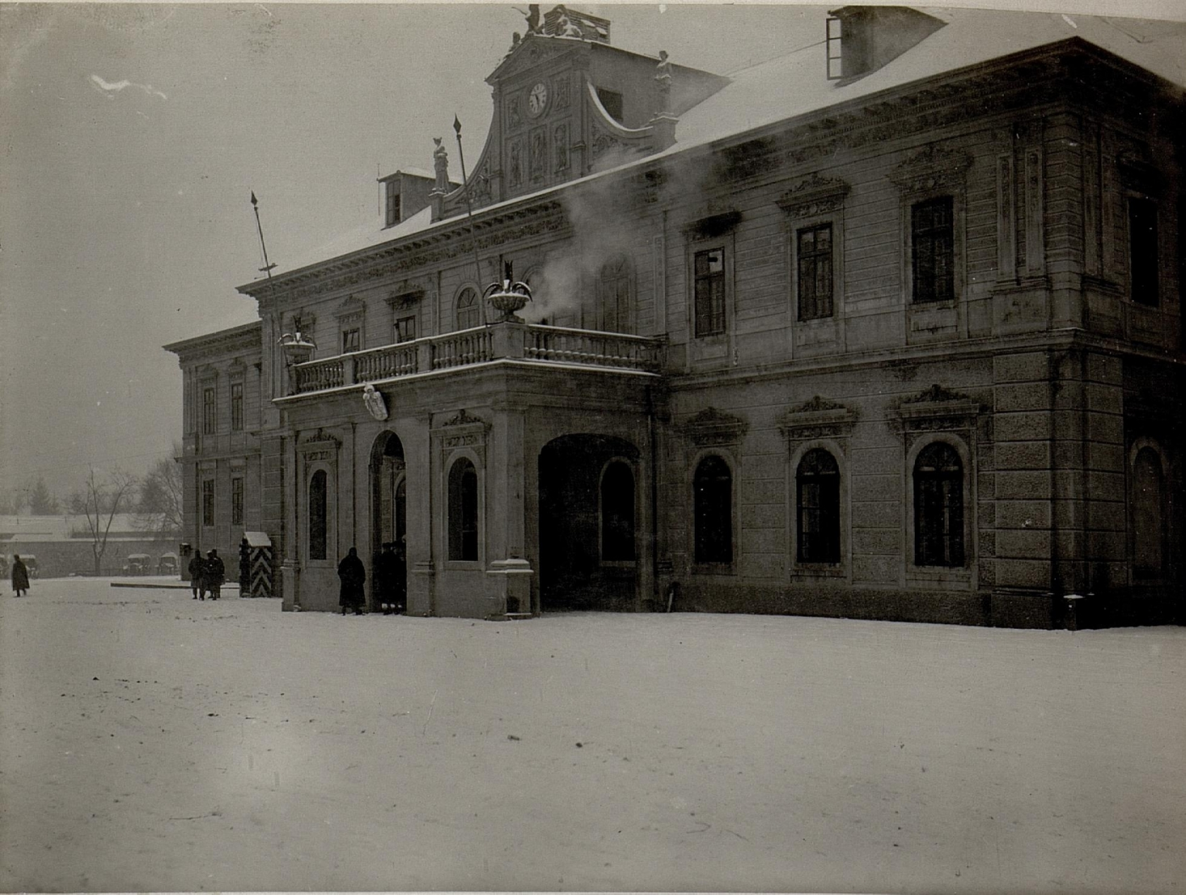 Regierungsgebäude (Konak) in Cetinje. Aufgenommen in Cetinje am 26. Februar 1916.